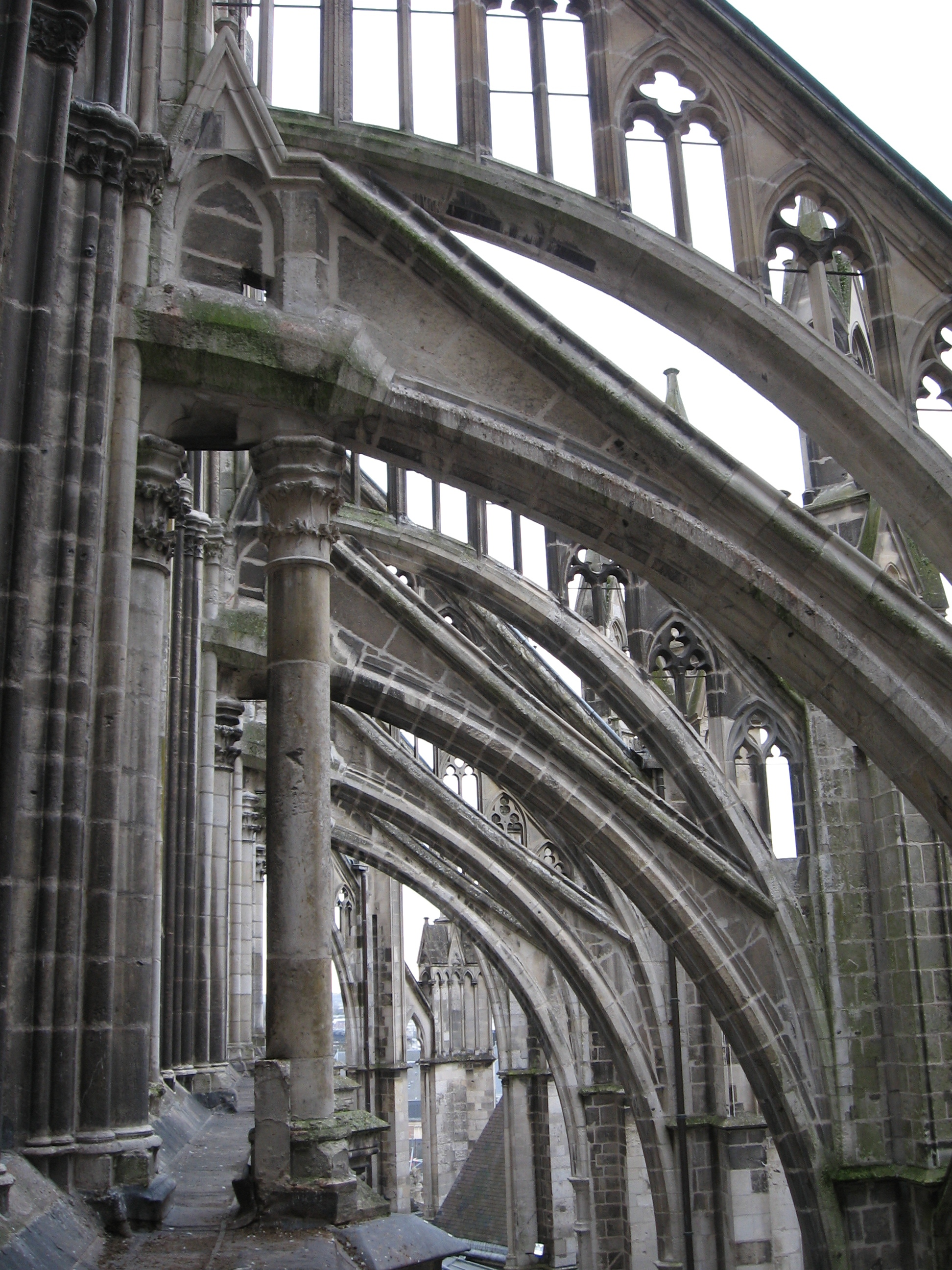 Amiens Cathédrale Notre-dame arc-boutant sud-est .